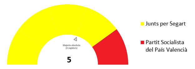 Corporació municipal de Segart, resultat de les elecciones del 26 de maig de 2019.